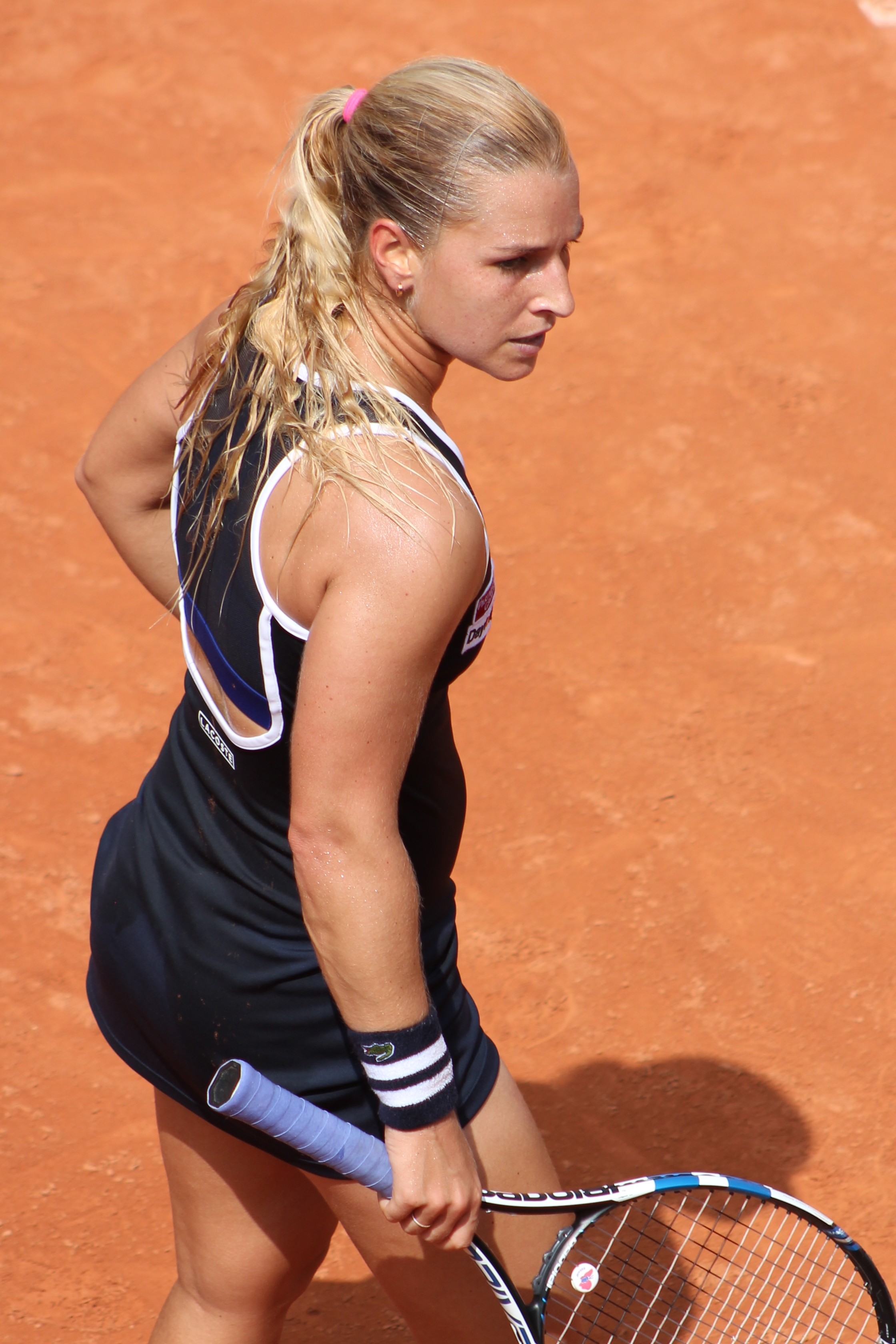 Cibulkova RG16 (2)